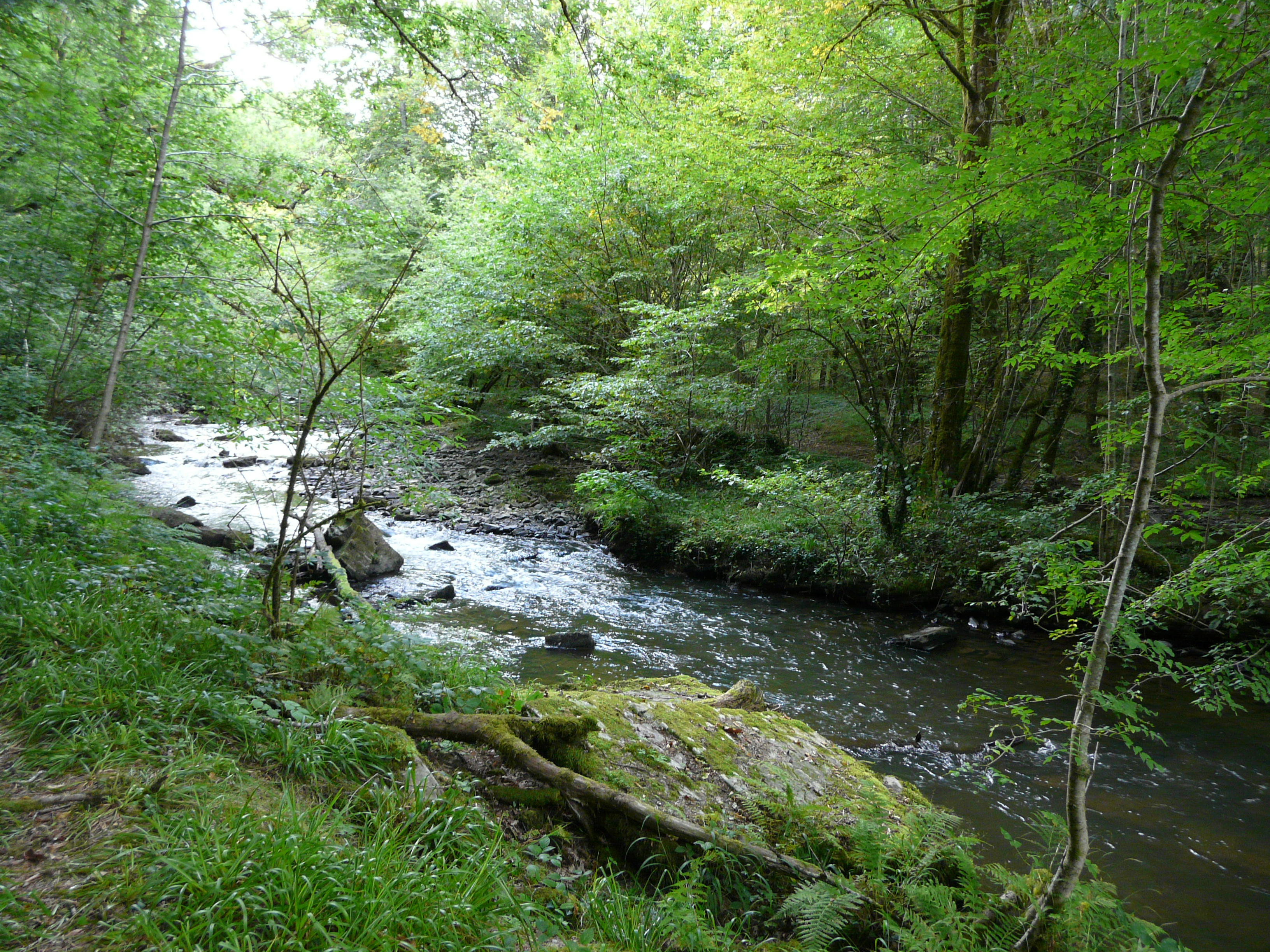 La Loue en amont du moulin du Bouc, Saint-Médard-d'Excideuil, Dordogne, France.